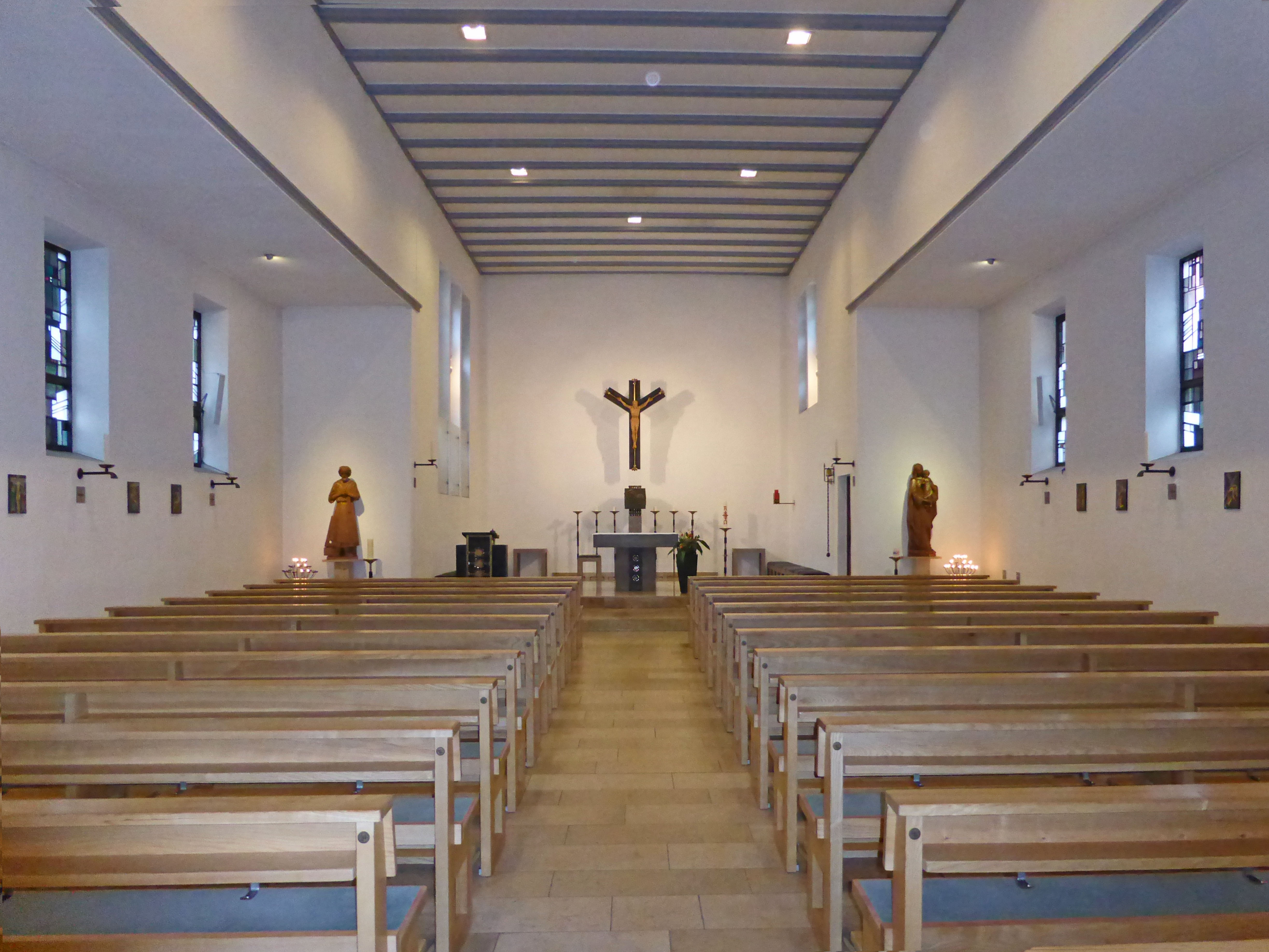 Katholische St.-Michael-Kirche in Veorsfelde.